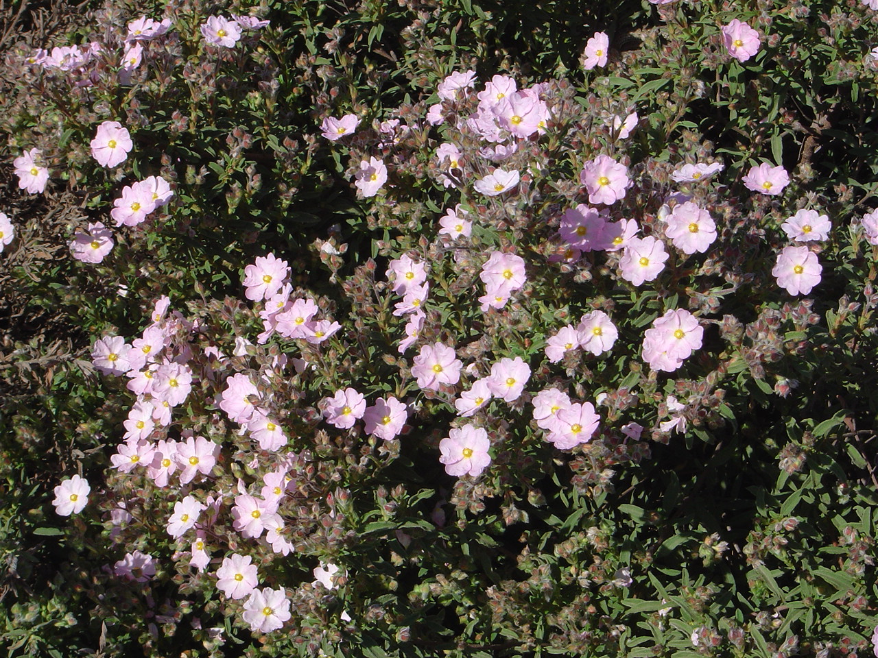 Visió de Cistus parviflorus.